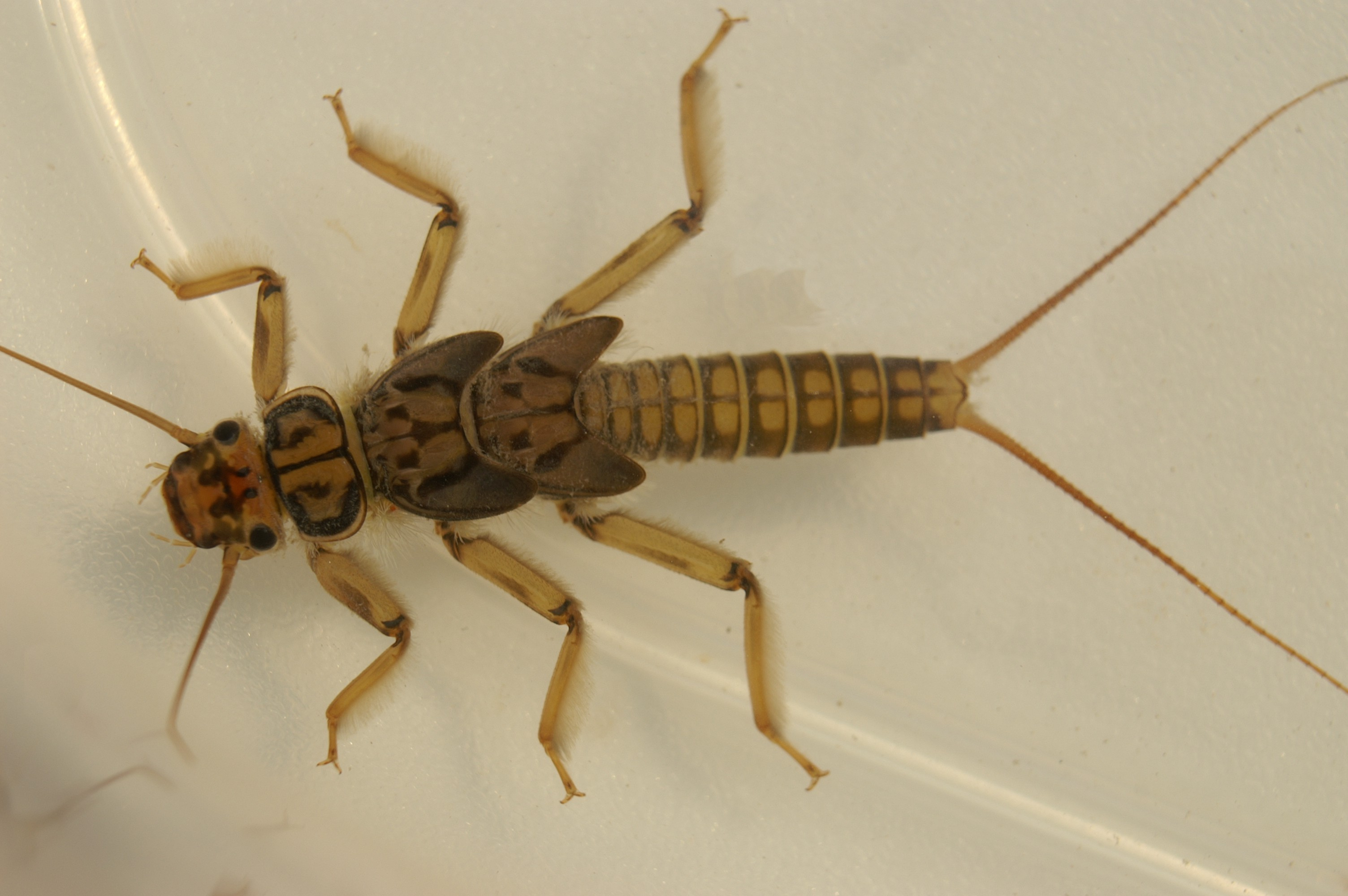 Steinfliegenlarve